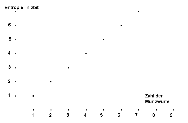 Das Bild stammt von Benutzer:rho. Es wurde von ihm selbst erstellt und ist public.domain. Es zeigt den Zusammenhang zwischen der Entropie in bit und der Zahl der Münzwürfe einer idealen Münze mit p = q = 0,5. Zur Unterscheidung der Zufallsinformation von der nichtzufälligen Information wird in der Grafik die Einheit zbit' ( Zufallsbit) vorgeschlagen.